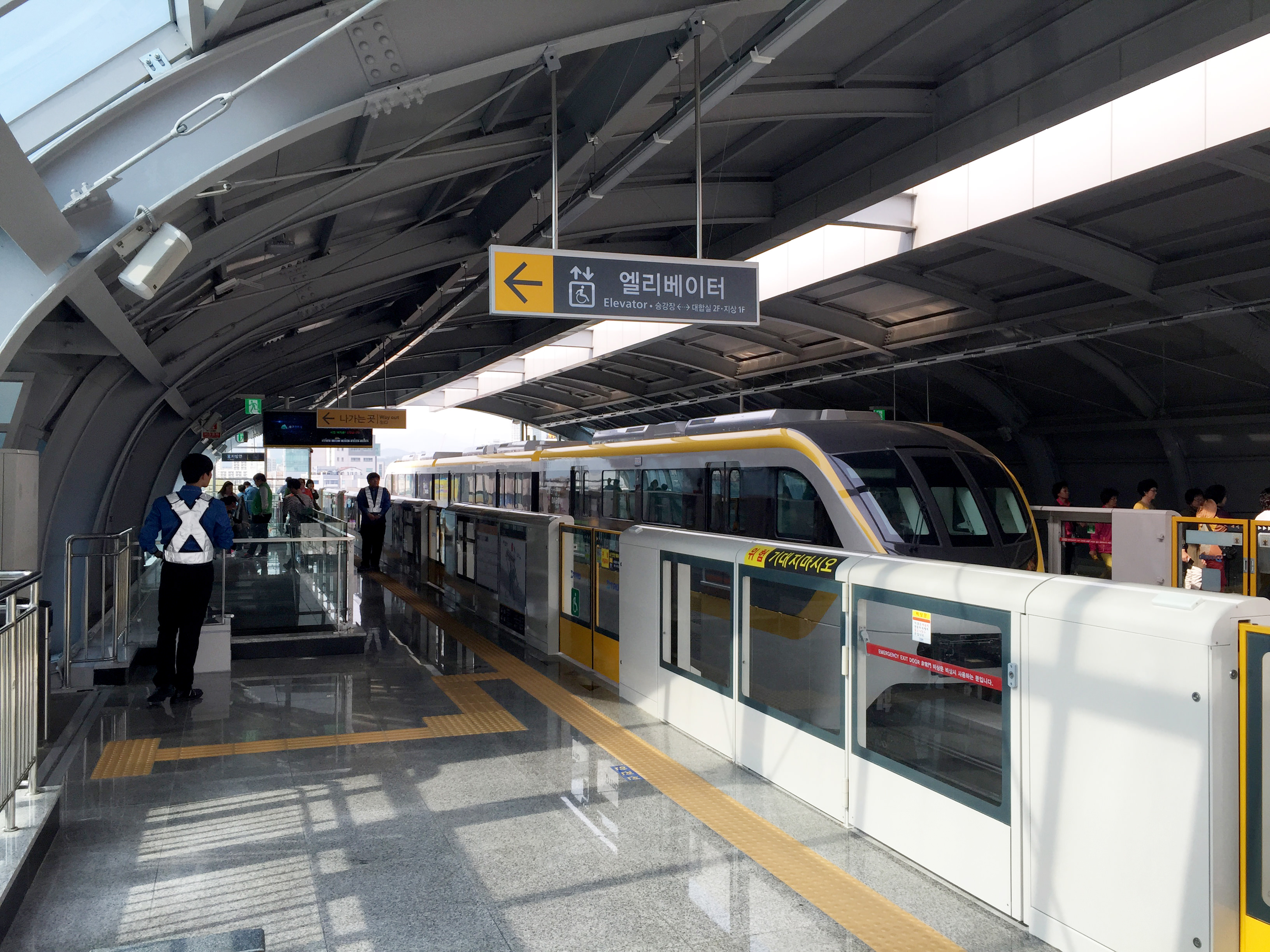 서문시장(동산병원)역 승강장